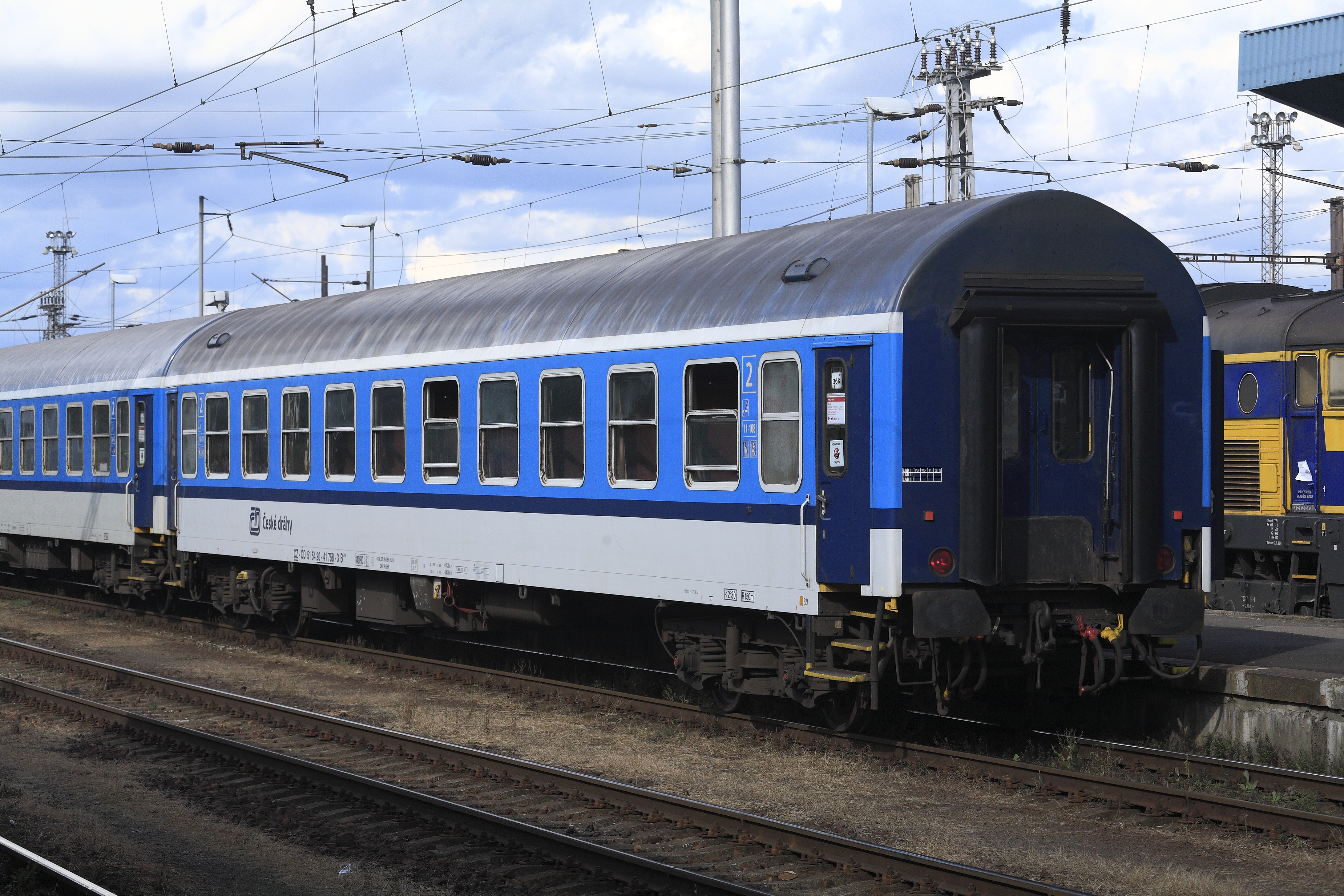 vom Waggonbau Bautzen in den 1970er Jahren geliefert. Dieser Wagen ist abgesehen vom Anstrich noch im Lieferzustand. Erkennbare Unterschiede zu den Wagen der Bauart Y sind vier Trittstufen, keine sichtbaren Federglieder zum Geschlossenhalten der Übergangstüren, keine Ölgefäße für die Drehgestellgleitstücke und keine Lufteinläufe im Dach. Auf der Abteilseite gibt es je einen Luftsauger über den Toiletten, auf der Gangseite ein Lüftergitter in Seitenwandmitte. Reine zweite-Klasse-Wagen haben zehn Abteile zwischen den Toiletten. Das hohe Dach ist im Gegensatz zu den B- und Y-Wagen der Vorgängerbauarten nicht notwendig, beibehalten wurde es nur für ein geschlossenes Aussehen der Wagenzüge.